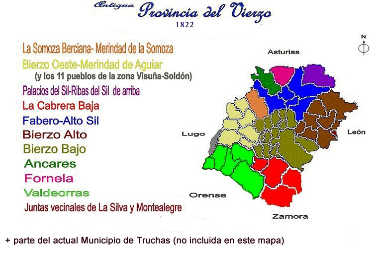 La antigua Provincia del Vierzo (Provincia de El Bierzo) de 1821 (terminada de de limitar en 1822)-1833 .